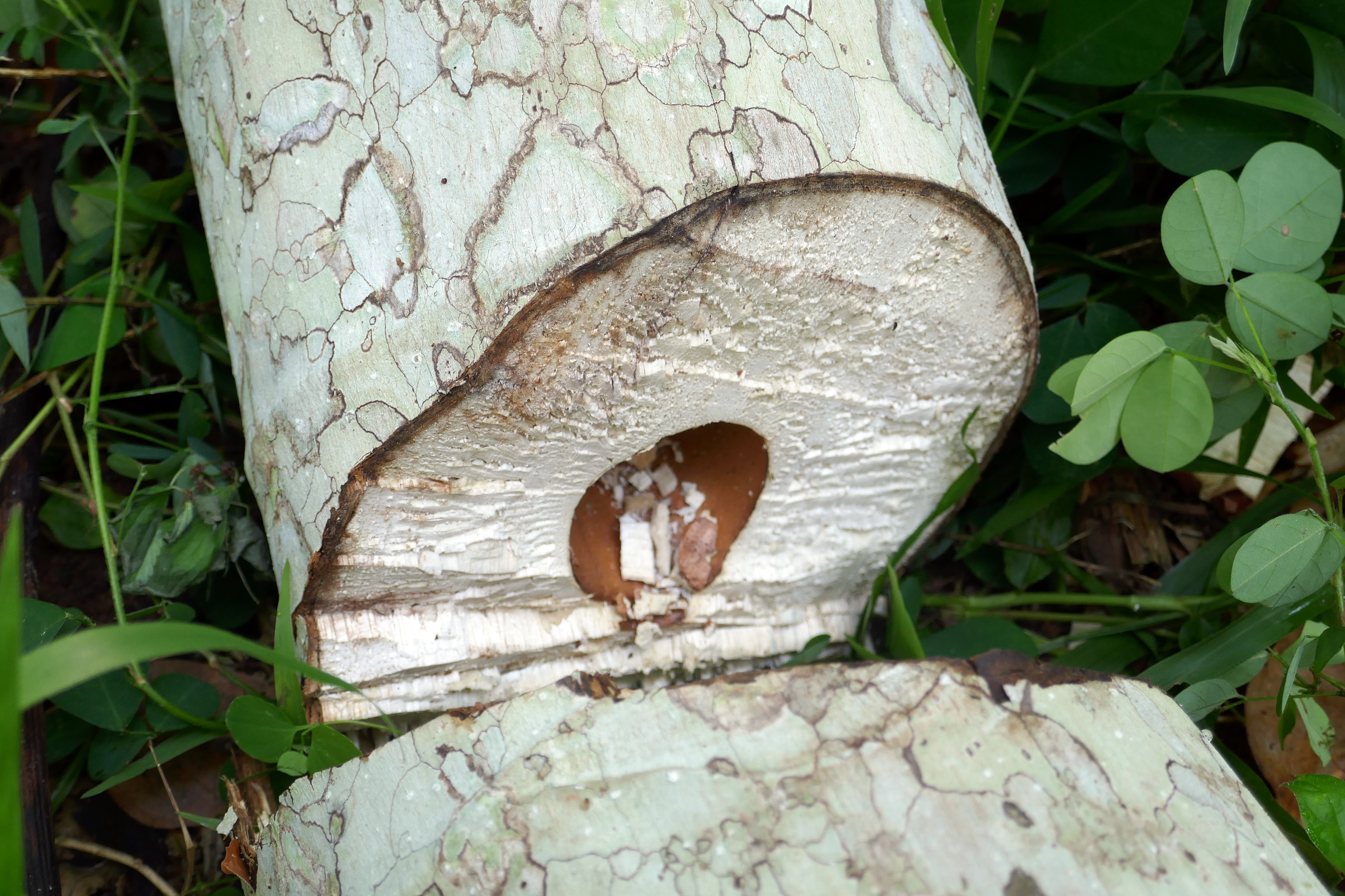 Parasolier (Musanga cecropioides) à l'est de l'île de São Tomé (São Tomé -et-Principe).